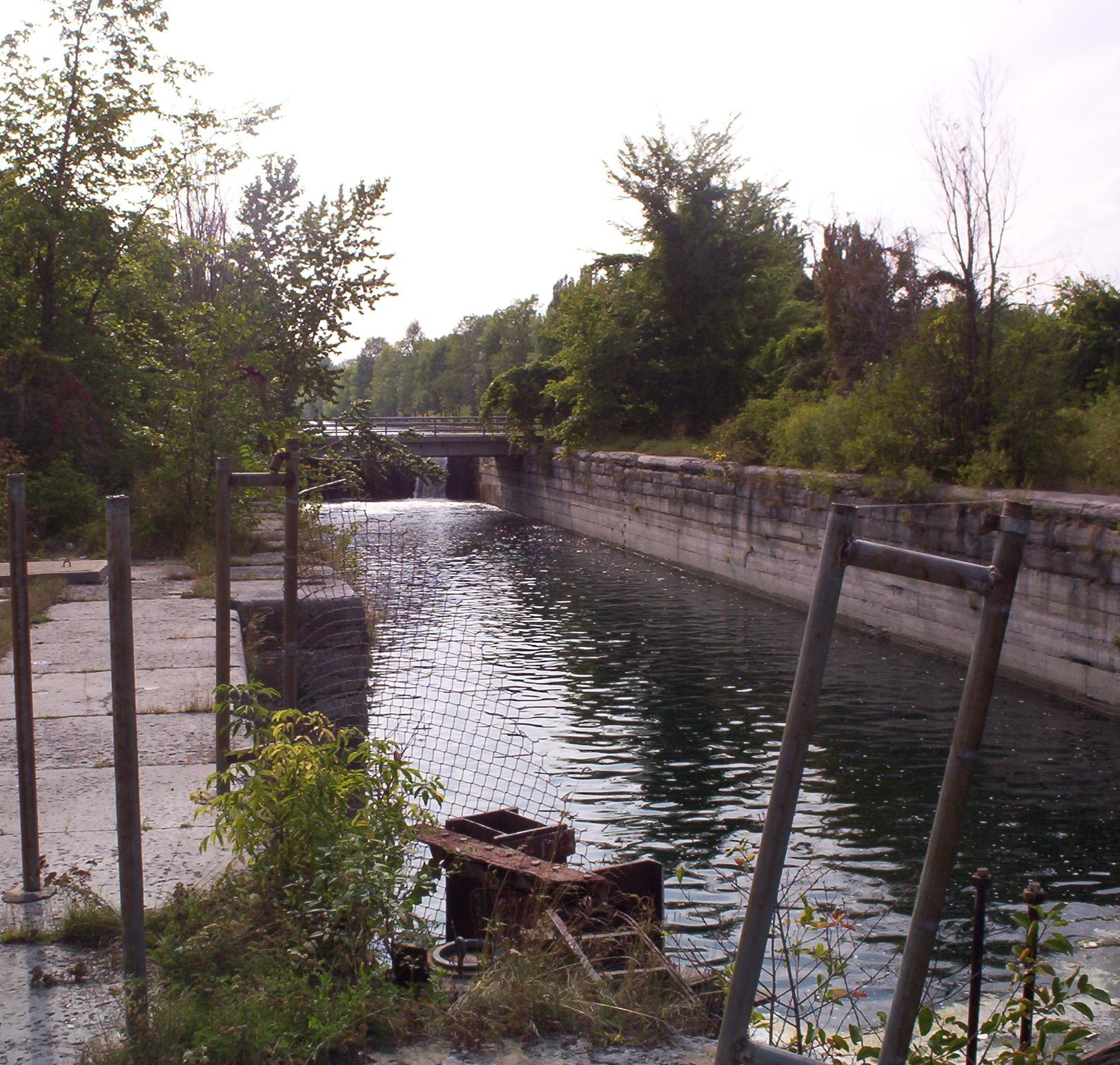 View on Soulanges Canal, Pointe-des-Cascades, Québec